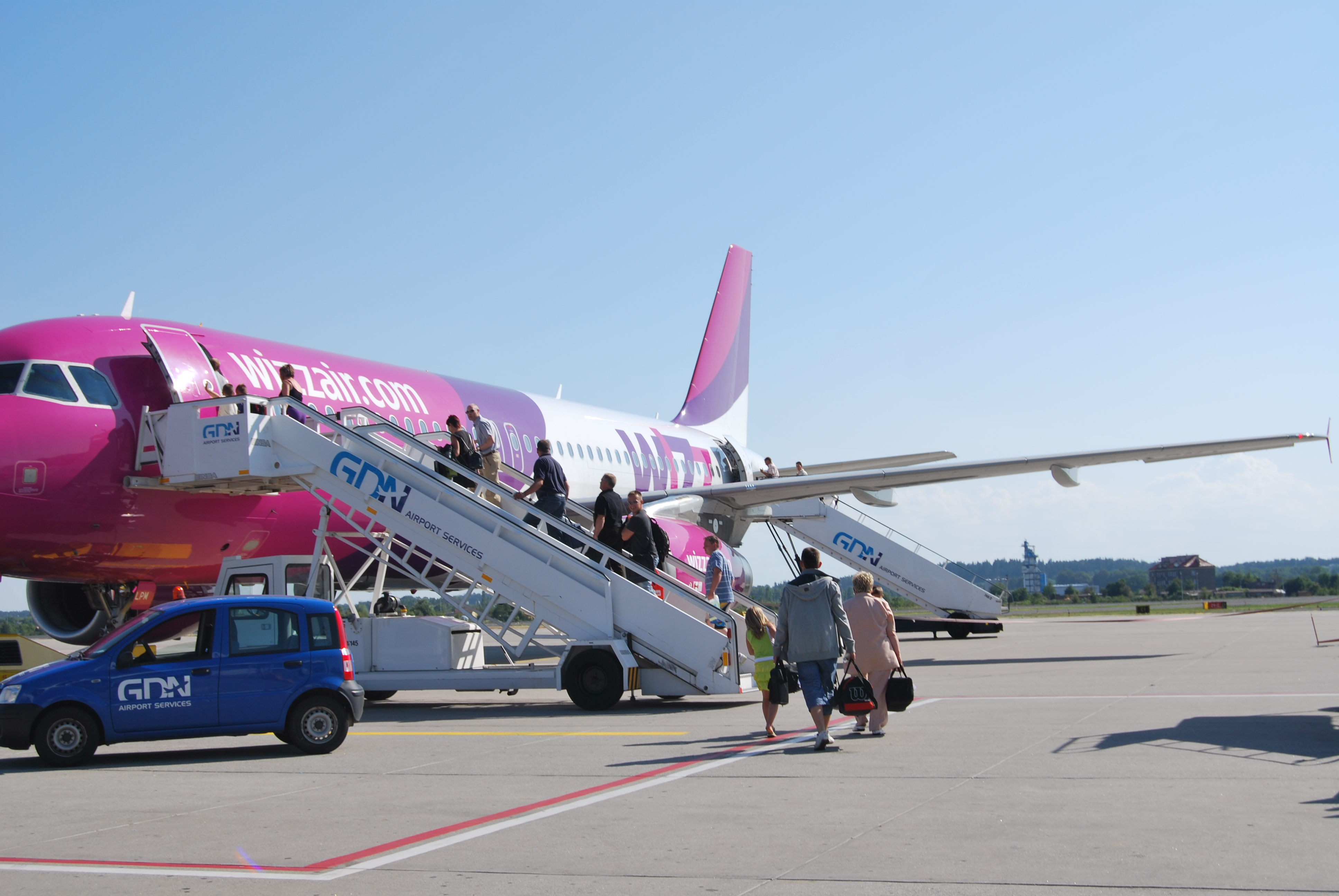 Gdansk Lech Walesa Airport 2009 r.